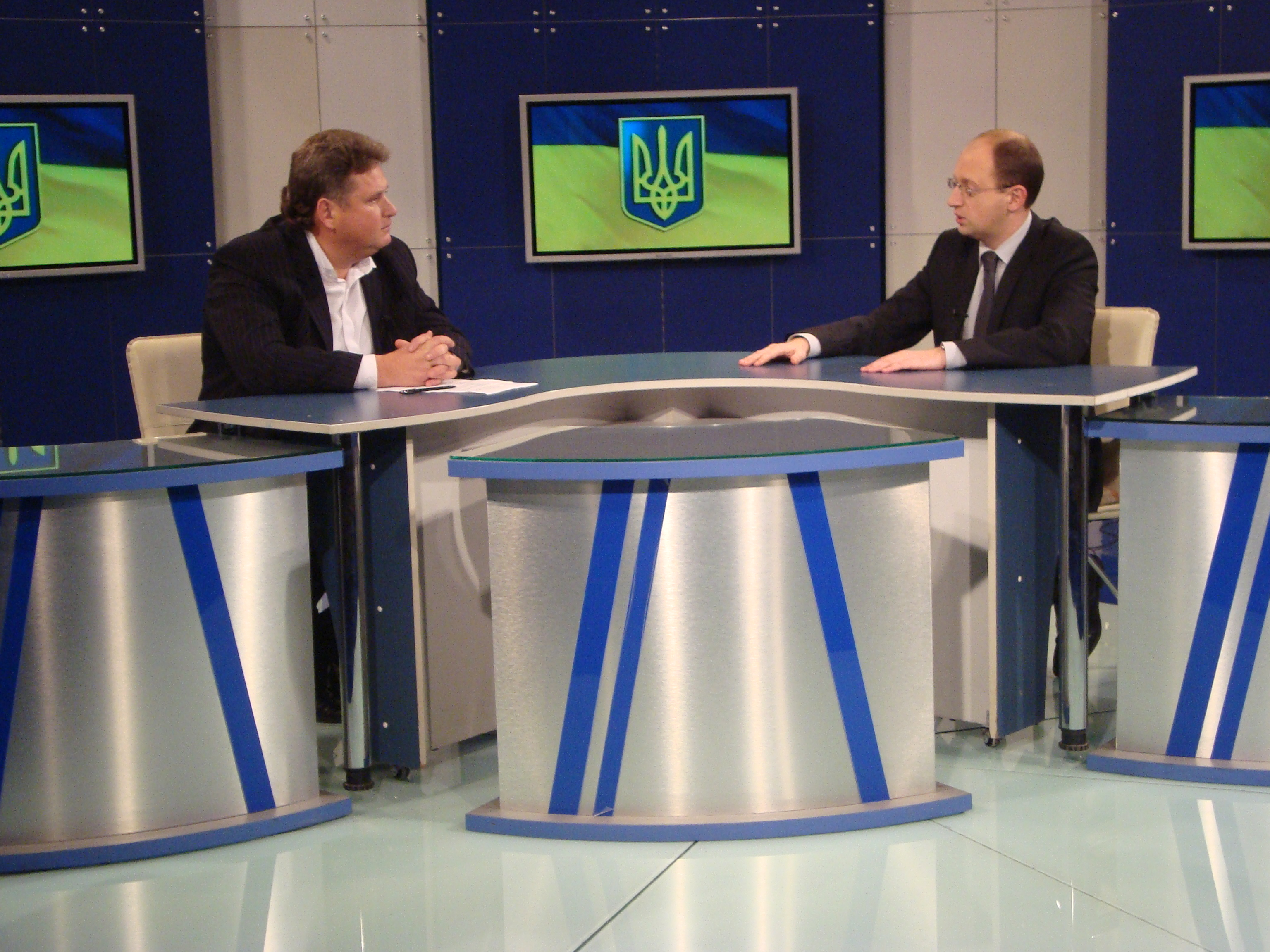 тележурналіст Фіделю Сухонос проводе передачі з провідними політиками країни